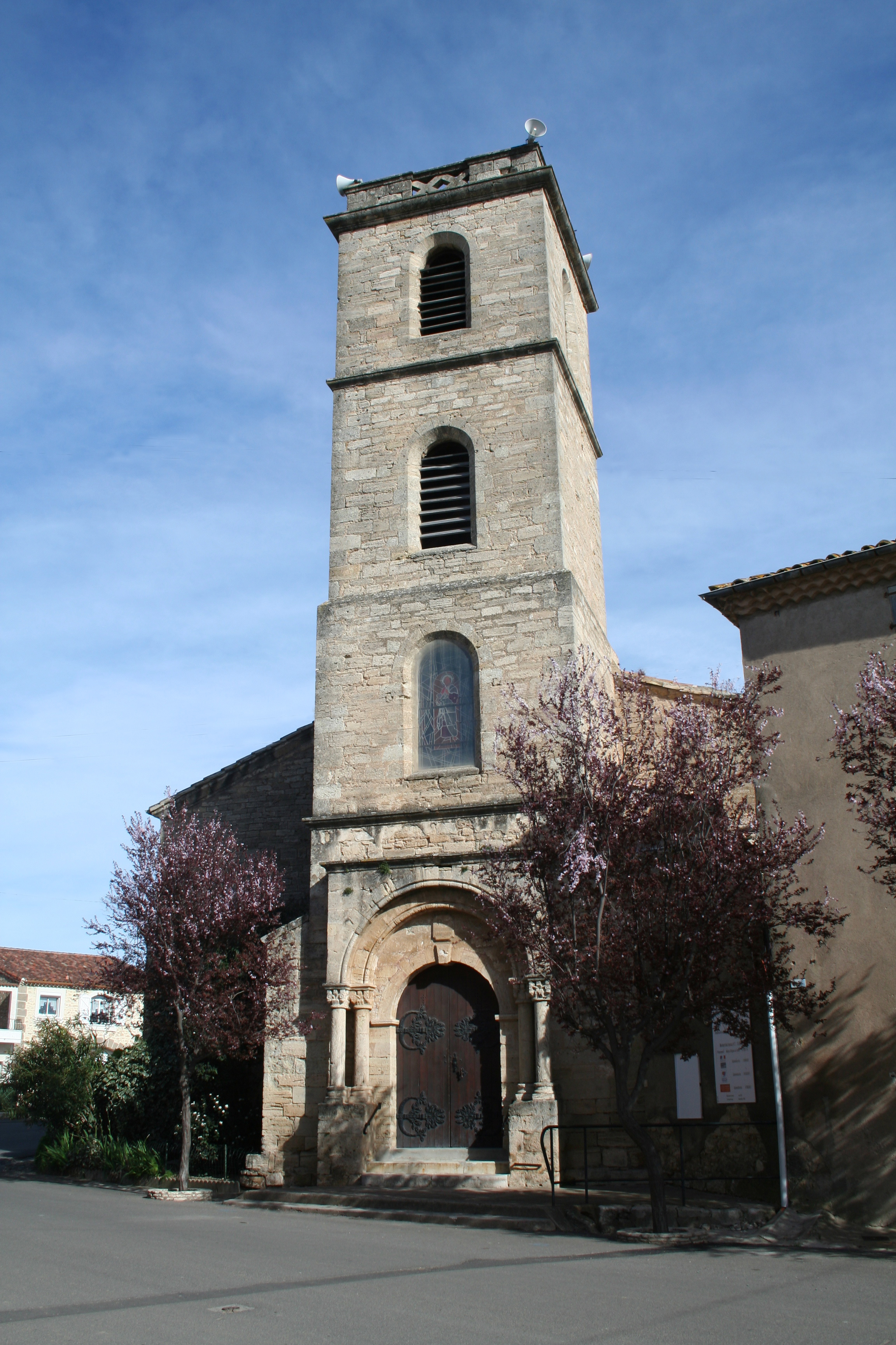 Alignan-du-Vent (Hérault) - église Saint-Martin.